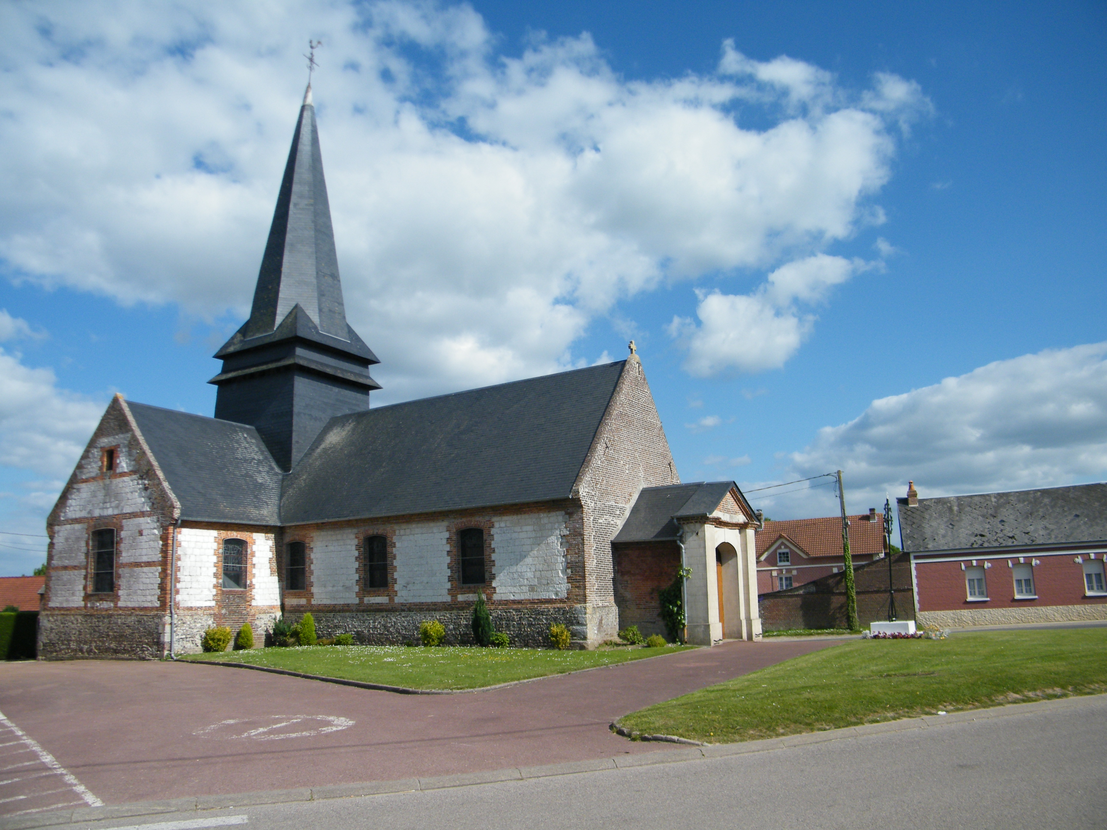 L'église.